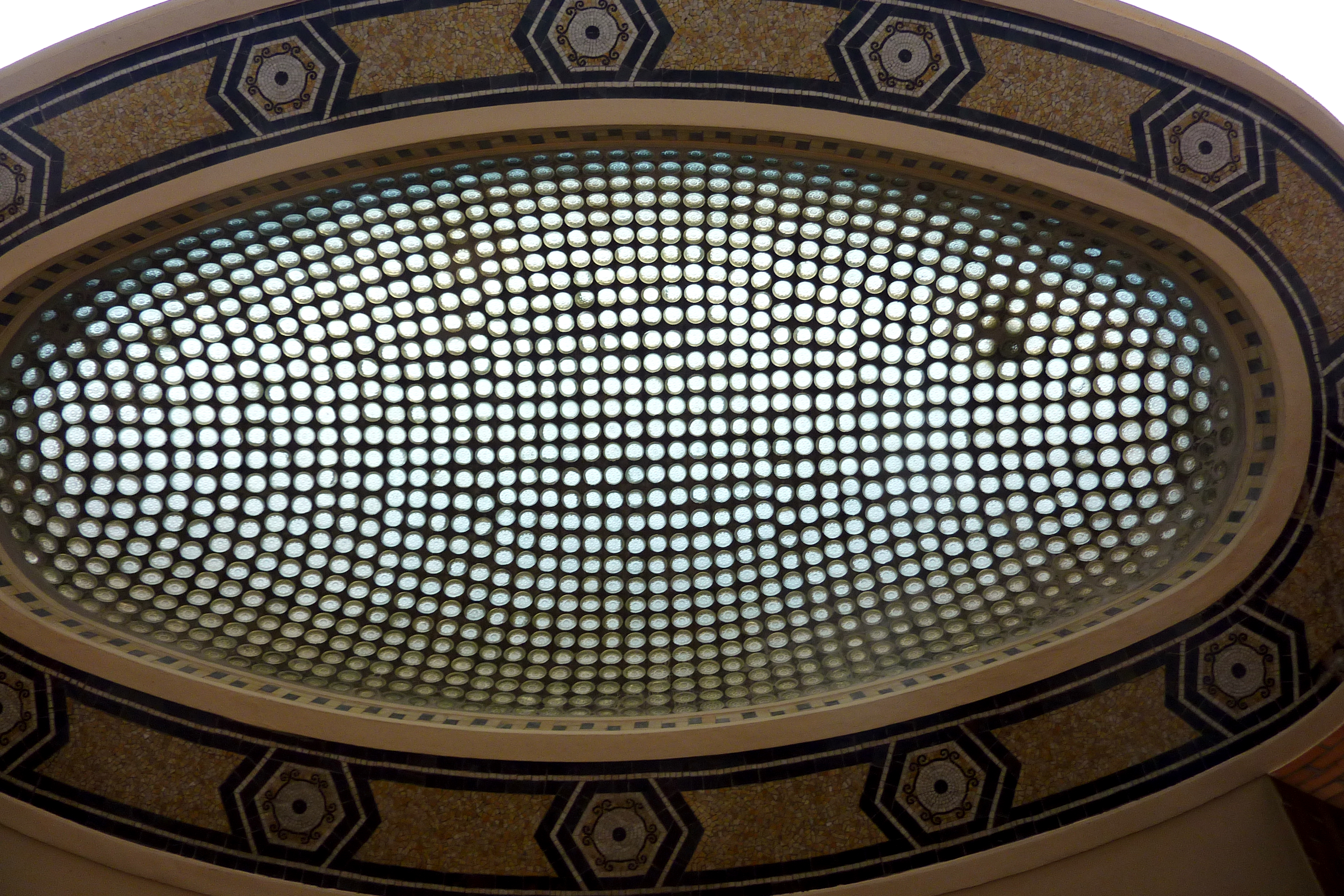 Central téléphonique Provence in Paris, 15-17 rue du Faubourg-Poissonnière, Vordach des Eingangs